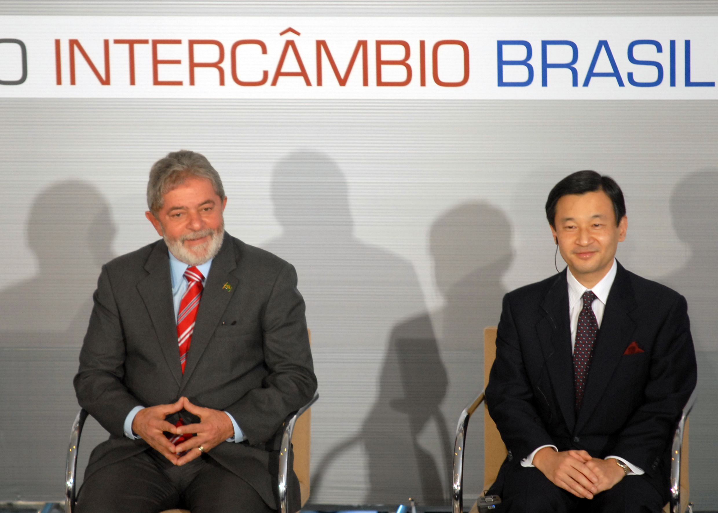 O presidente Luiz Inácio Lula da Silva e o Príncipe Naruhito, herdeiro do trono do Japão, durante comemorações dos 100 anos da imigração japonesa no país